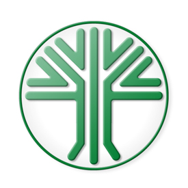 Logobaum der FriedWald GmbH